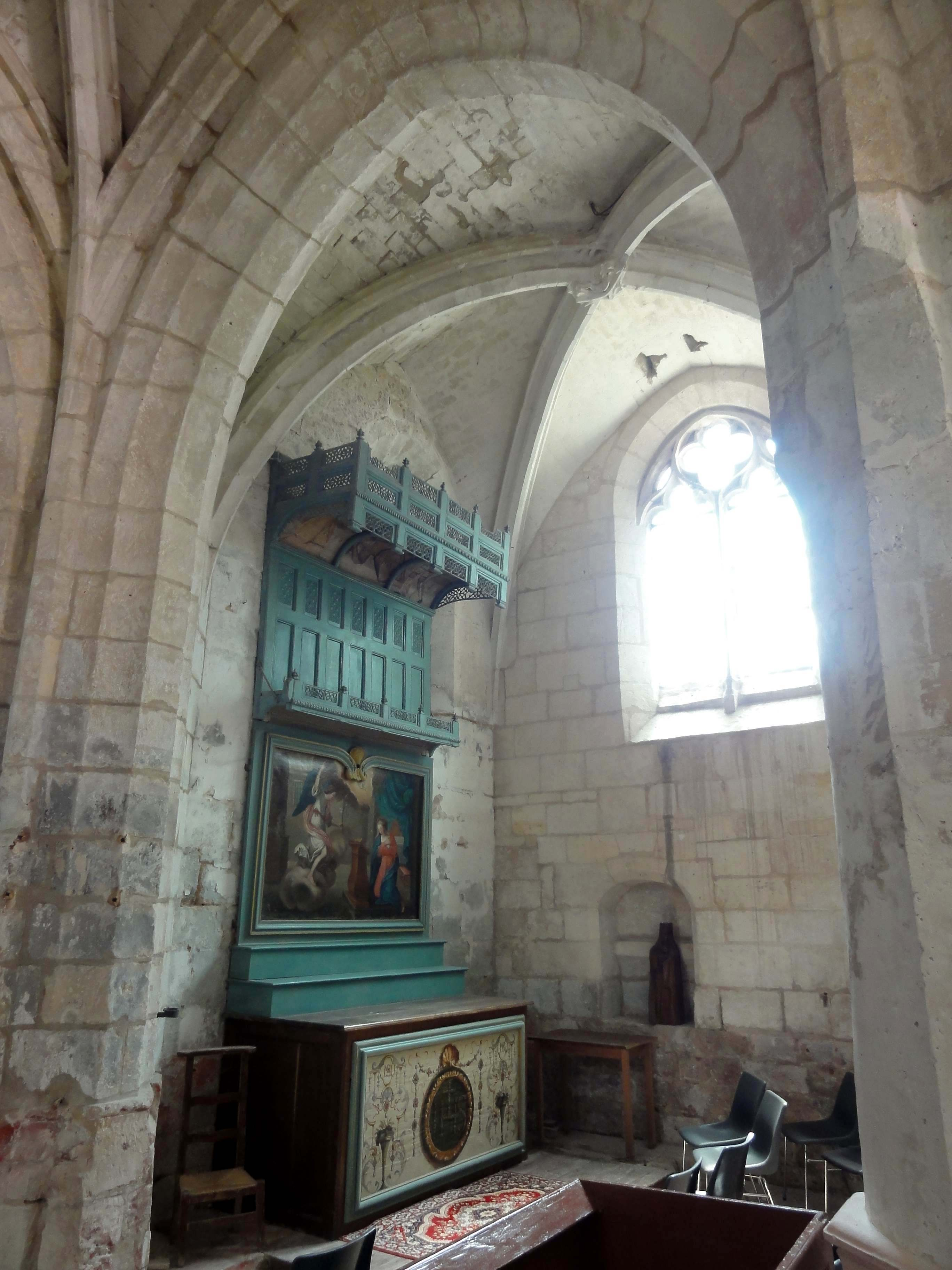 Intérieur de l'église (voir titre).